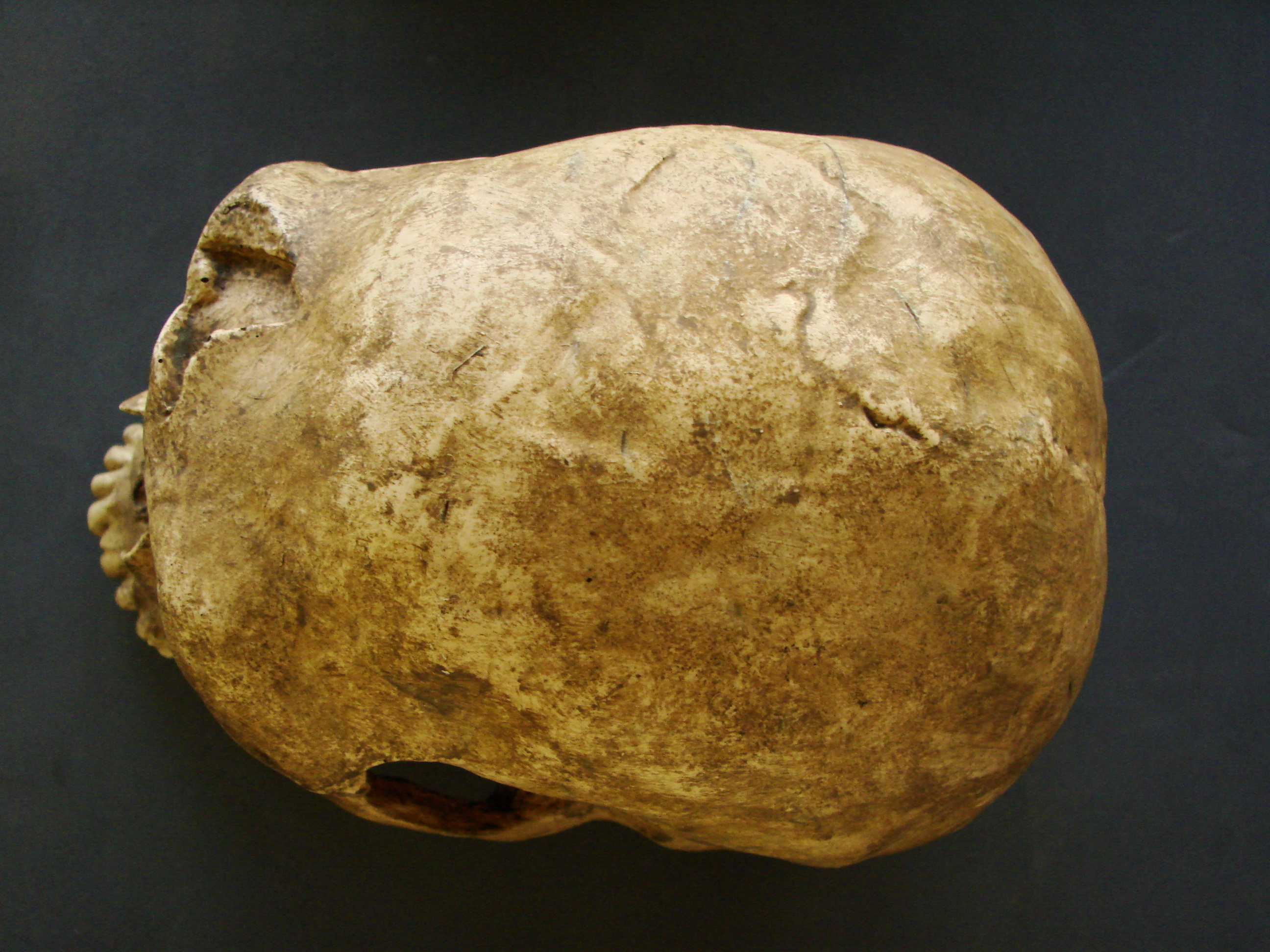 Muséum d'Anthropologie, campus universitaire d'Irchel, Université de Zurich (Suisse) : Homo neanderthalensis (La Ferrassie, France)